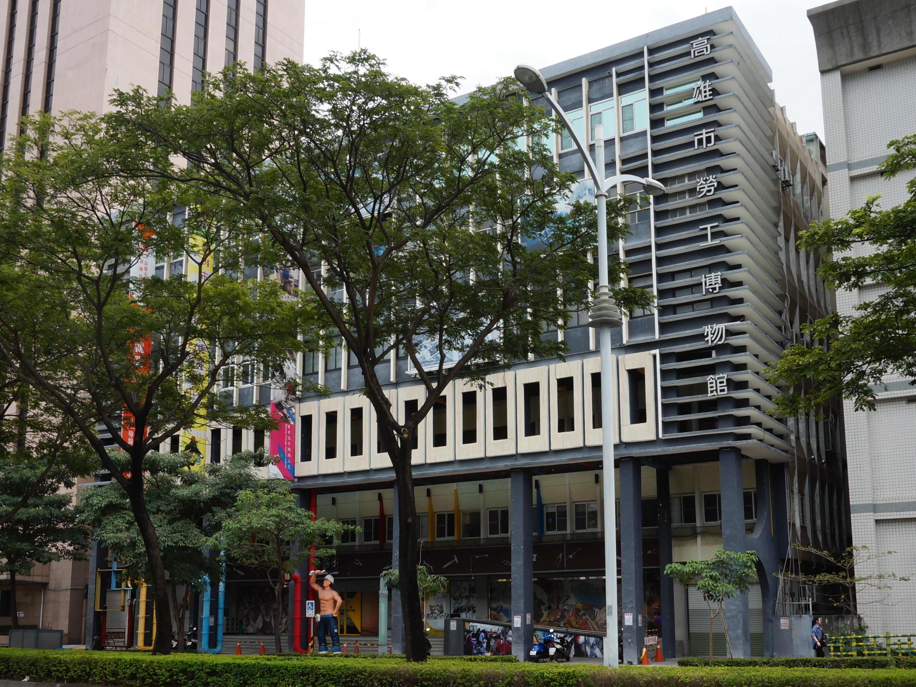 高雄市勞工博物館，地址：高雄市前金區中正四路261號。